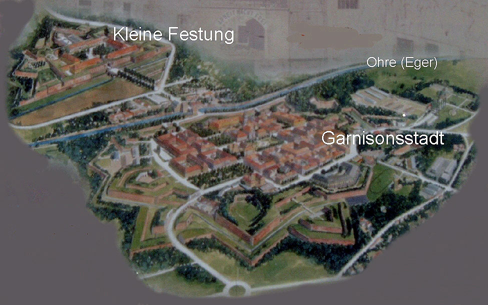 Plan von Theresienstadt - 1940 - 1945 eigene Bearbeitung eines Fotos der öffentlichen "Ton-Informationstafel" in der "Rathausgasse" in Theresienstadt Aufnahme: August 2005 Url